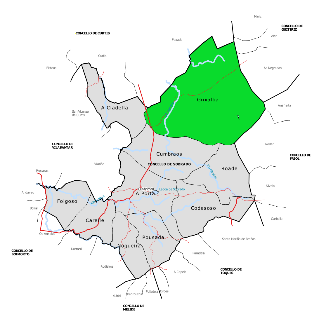 Mapa da parroquia de Grixalba no concello de Sobrado (Galiza).